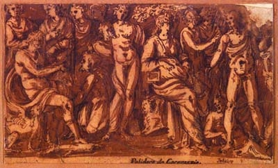 Ce tableau appartenait au décor sur l'Histoire de Psyché qui décorait le palais du poète Bernardino Rota à Naples. Deux autres élément de ce décor : Psyché abandonnée par ses parents, ainsi que Les jeux de nymphes, satyres et petits amours, sont conservés à Hampton Court.